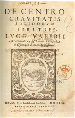 Cover of De centro gravitatis solidorum libri tres